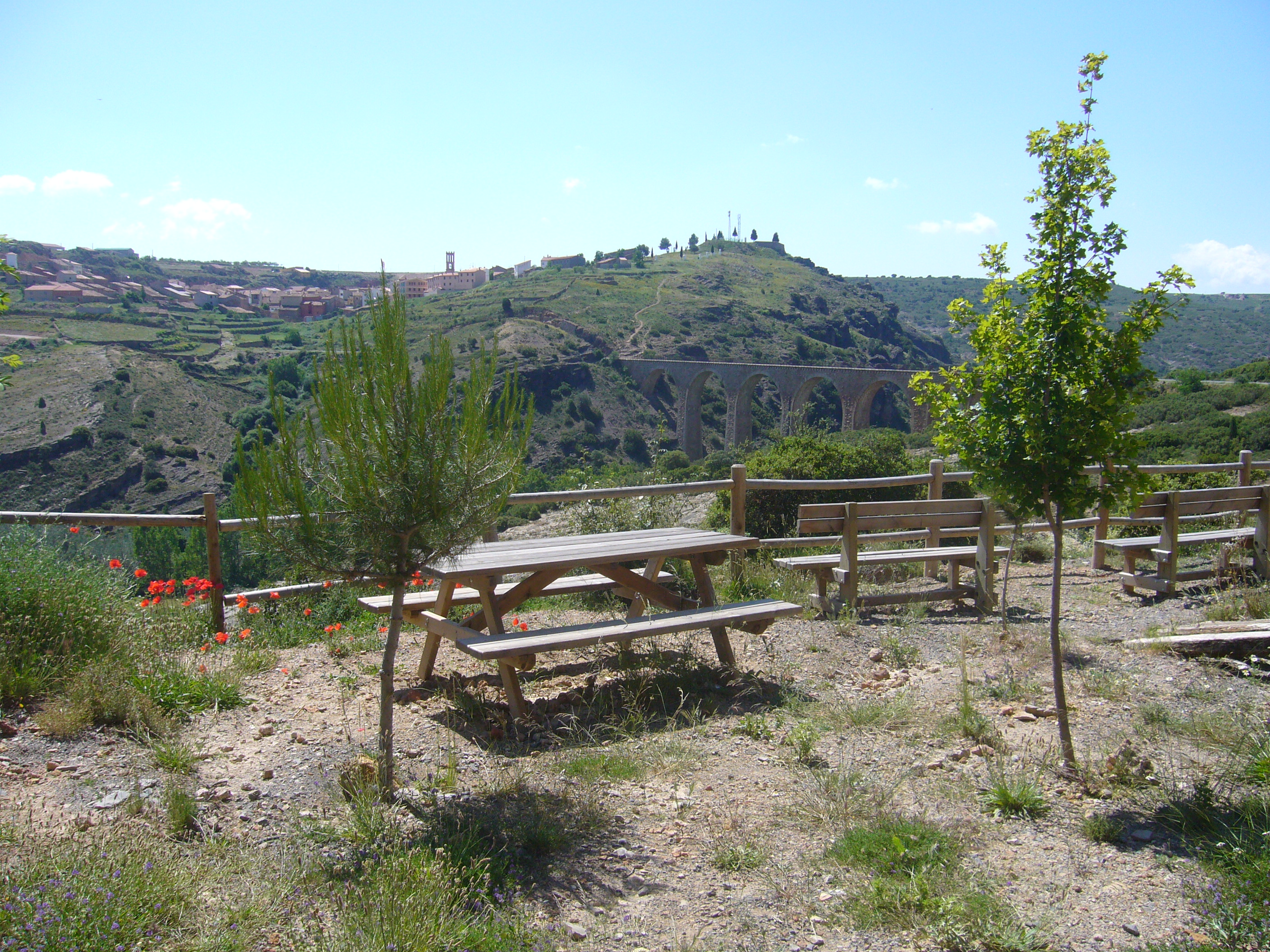 vista d'Albentosa i pont de la via verda des d'una àrea de descans